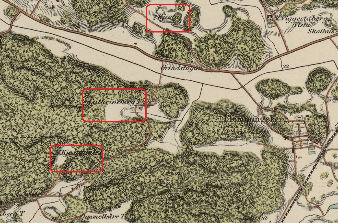 Kästa, Kästadal, Katrineberg, Flemingsberg mm på Topografiska Corpsens karta